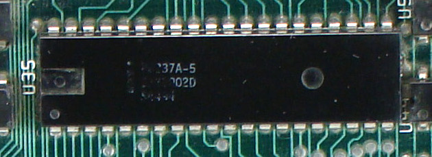 Intel 8237A usado en la tarjeta madre del IBM PC original.